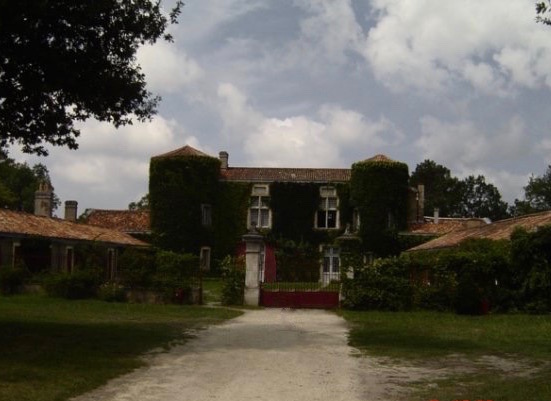 château de Montbron (Biscarosse)